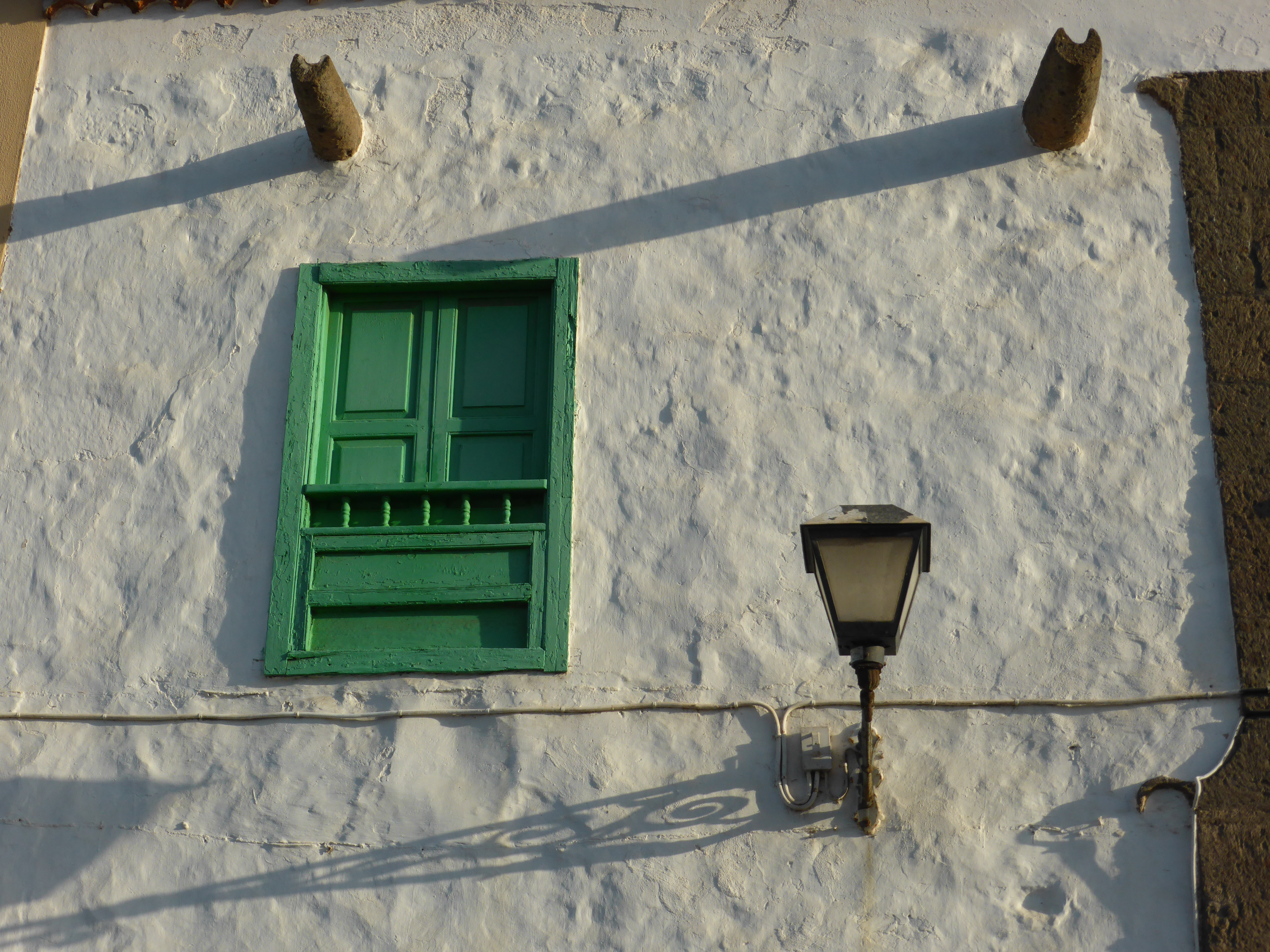 Ventana canaria, del barrio de Vegueta, calle Ramón y Cajal. Detalle de la fachada de la casa donde residió el desaparecido etnógrafo e historiador José Antonio Pérez Cruz ("Teno"), fallecido en agosto de 2016.